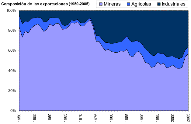 Composición de las exportaciones chilenas por sectores relevantes (1950-2005) Fuente: Elaboración propia con base en datos de "Estadísticas Históricas de Chile 1810-1995" de la P.U.C de Chile y del B.Central.